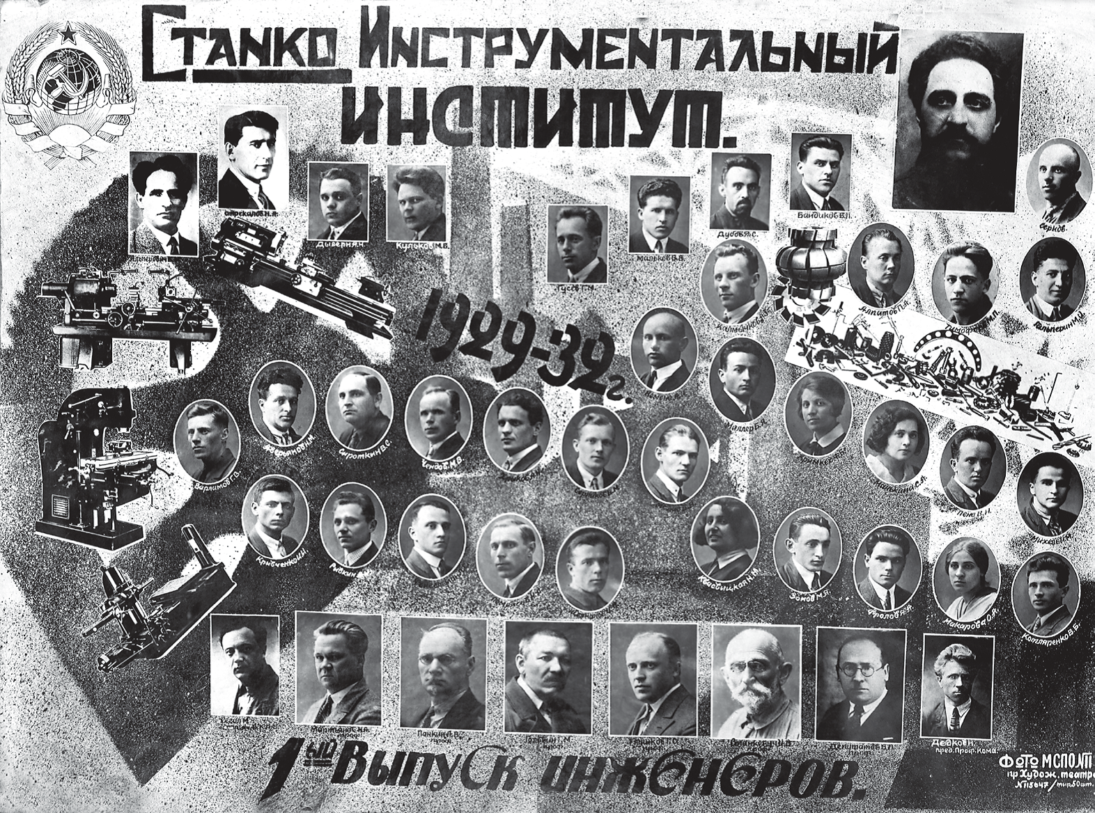 Первый выпуск инженеров Московского станкоинструментального института